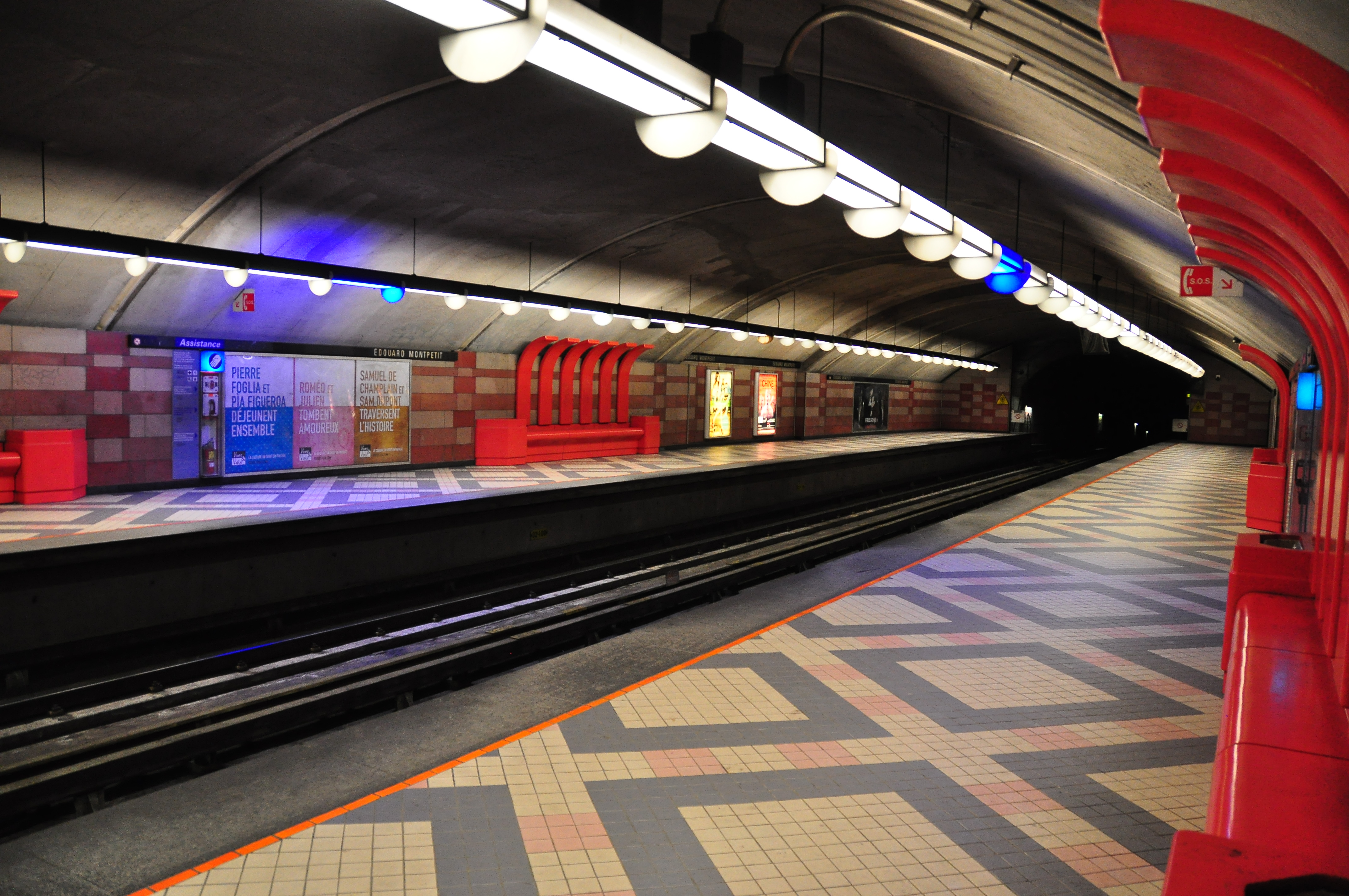 Métro Édouard-Montpetit